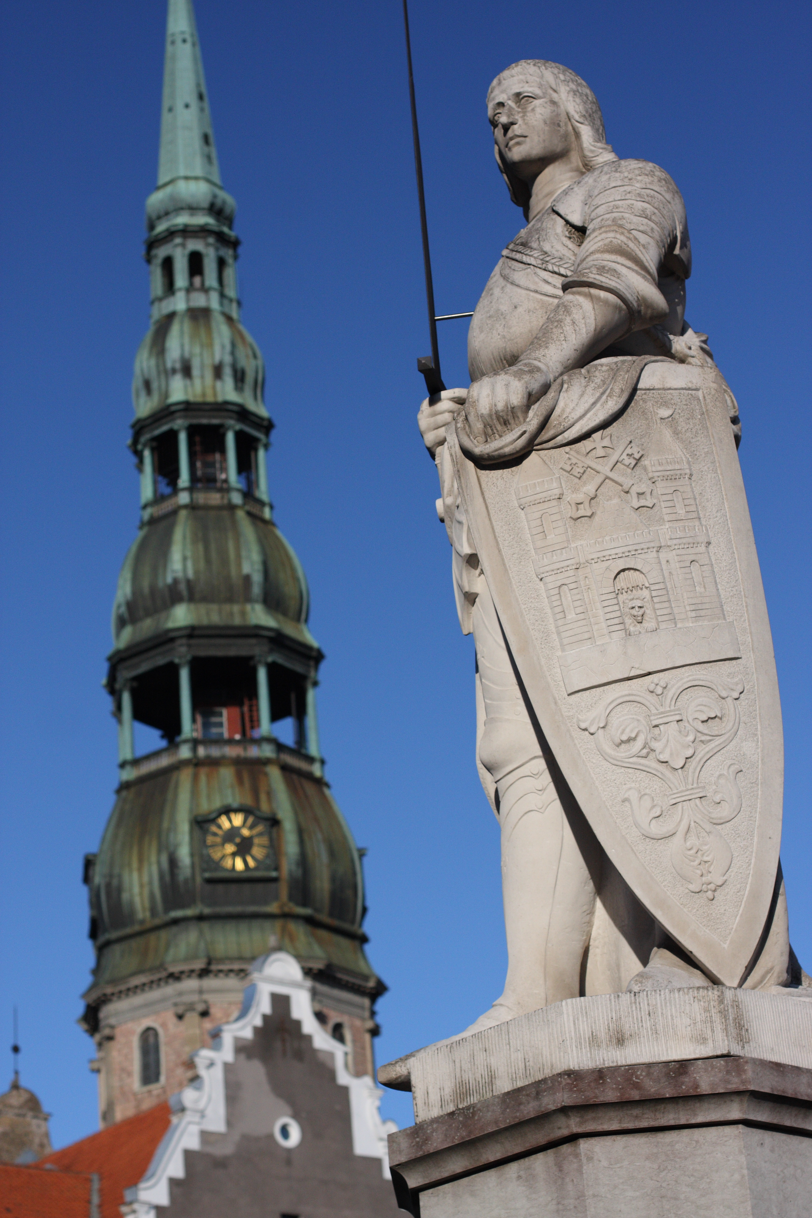 Riga, Latvia